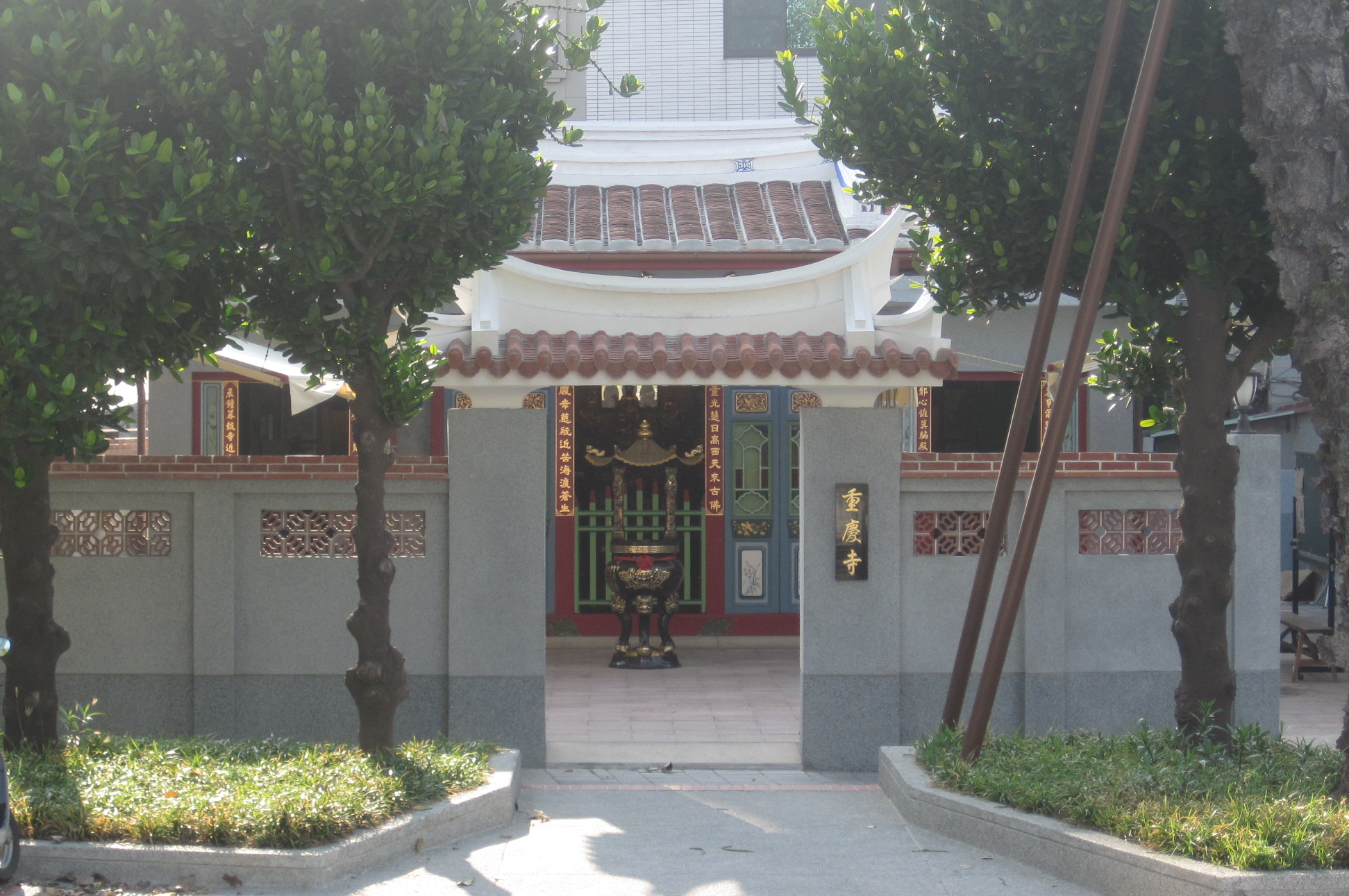 2014年所拍攝之整修後的重慶寺